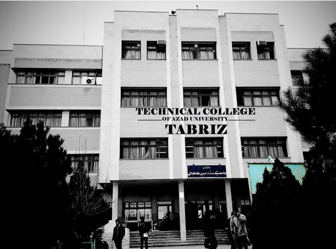 فنی ومهندسی 1